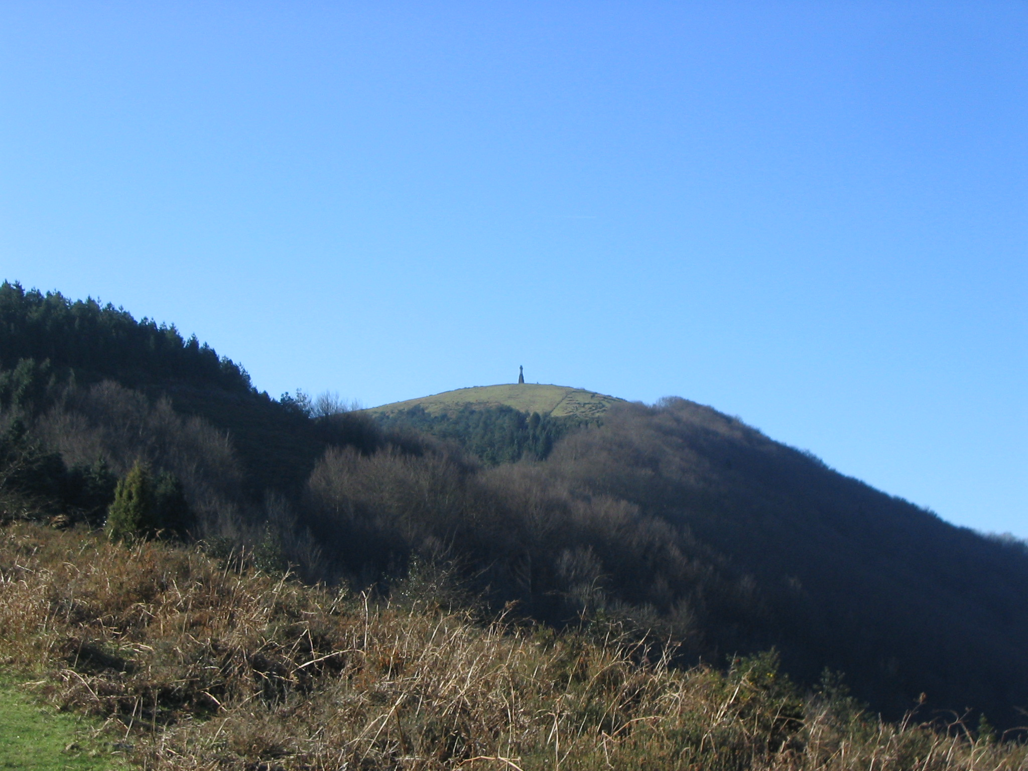 Montaña Saibigain Abadiano, Vizcaya, País Vasco, España.